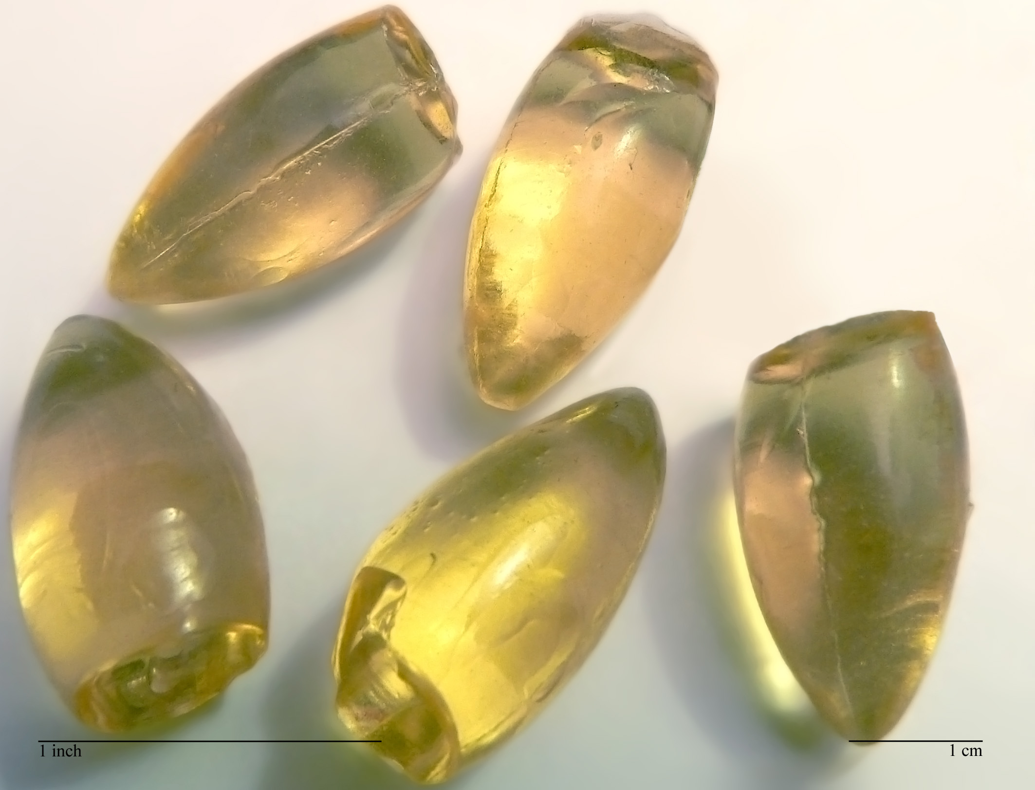 Glycerin suppositories (laxative)